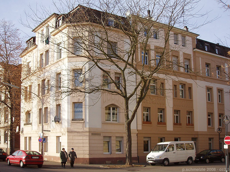 Denkmalgeschütztes Wohnhaus in der Happelstraße 57 in Heilbronn